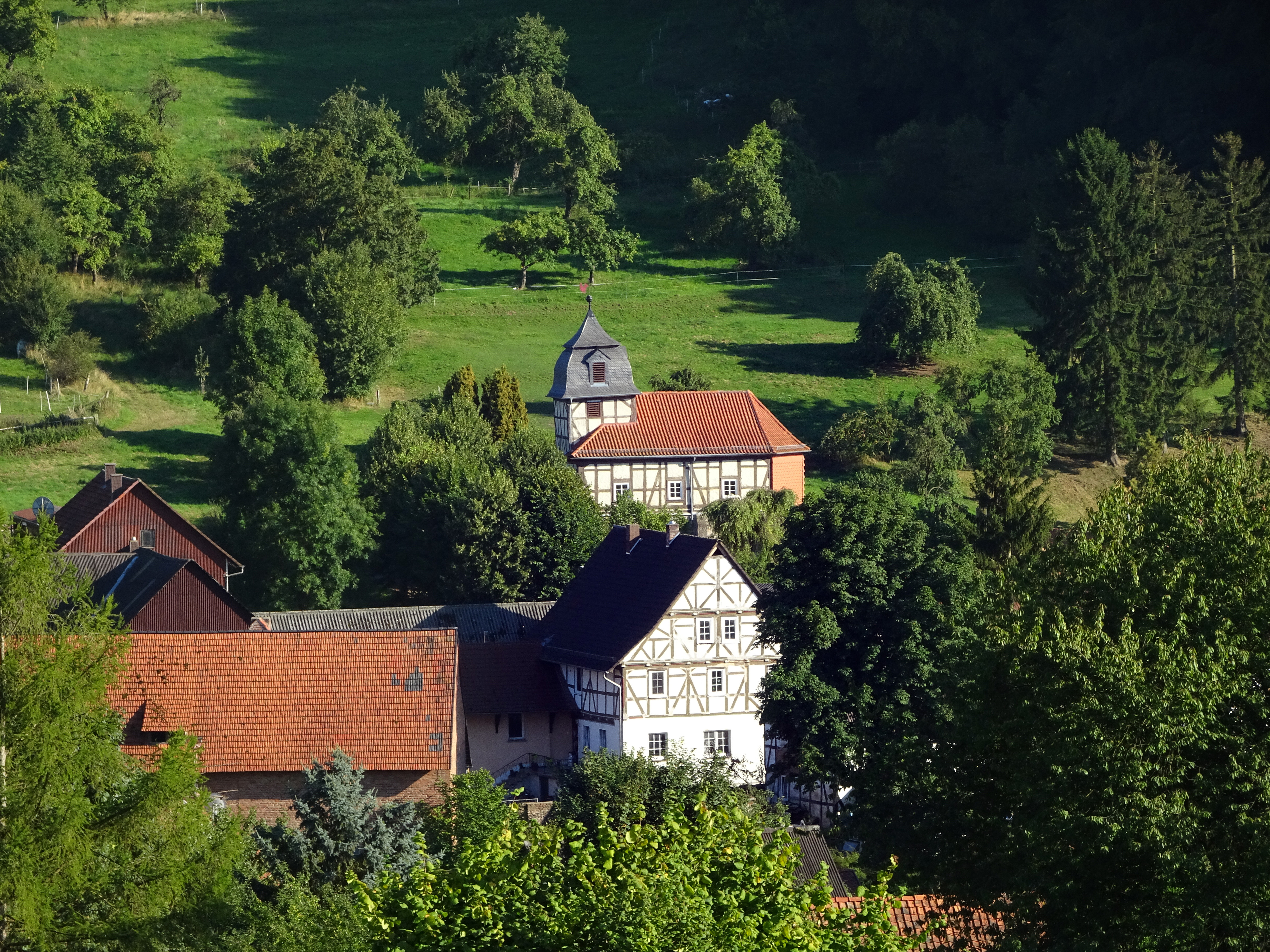 Mönchhosbach, Gemeinde Nentershausen im Landkreis Hersfeld-Rotenburg im Nordosten Hessens. Die kleine Dorfkirche am Ortsrand von Mönchhosbach stammt in ihrer heutigen Gestalt aus dem Jahr 1781. Eine Inschrift an der Nordseite der Kirche zeugt davon. Vermutlich stand schon vorher eine Kirche an der gleichen Stelle, von der Mauerwerk und Fundamente beim Neubau wieder verwendet wurden. Die heutige Kirche besteht aus zwei Geschossen. Das Erdgeschoss ist aus Bruchstein gemauert, das obere in Fachwerk gezimmert. Dieser Fachwerkausführung verdankt die Mönchhosbacher Kirche ihre Aufnahme in die Reihe der förderungswürdigen Fachwerkkirchen in Hessen und damit einer Grundrenovierung und Restaurierung in den Jahren 1980 bis 1983.